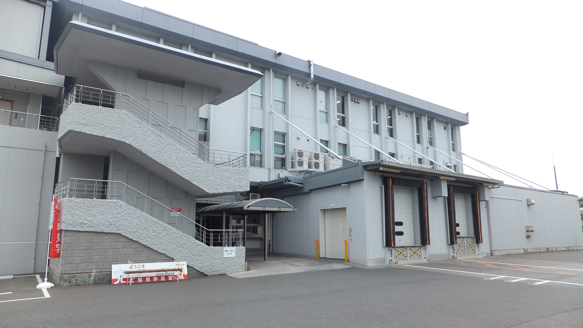 神戸ヤクルト本社